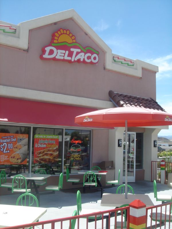 Del Taco is goood